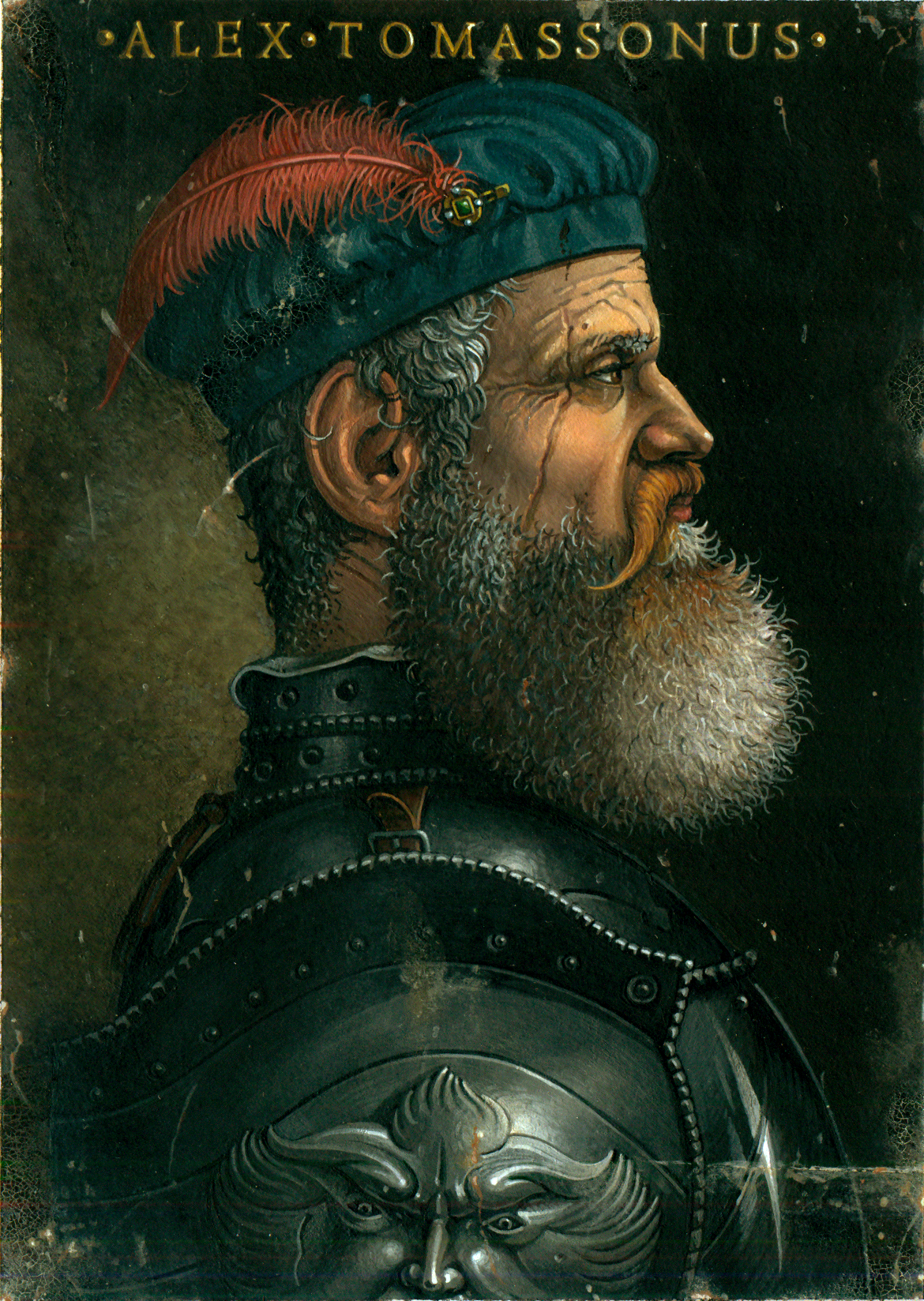 Ritratto di Alessandro da Terni